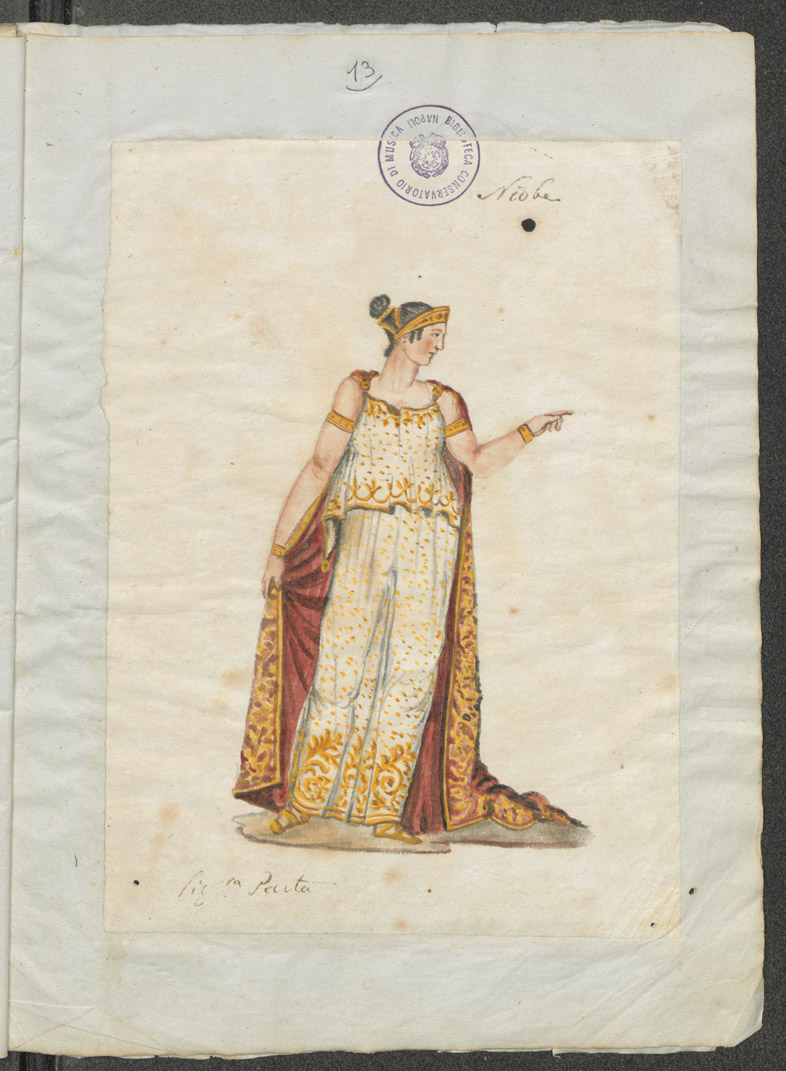 Giuditta Pasta nelle vesti di Niobe di Giovanni Pacini, rappresentata il 19 novembre 1826 al Teatro San Carlo di Napoli il 19 novembre 1826.